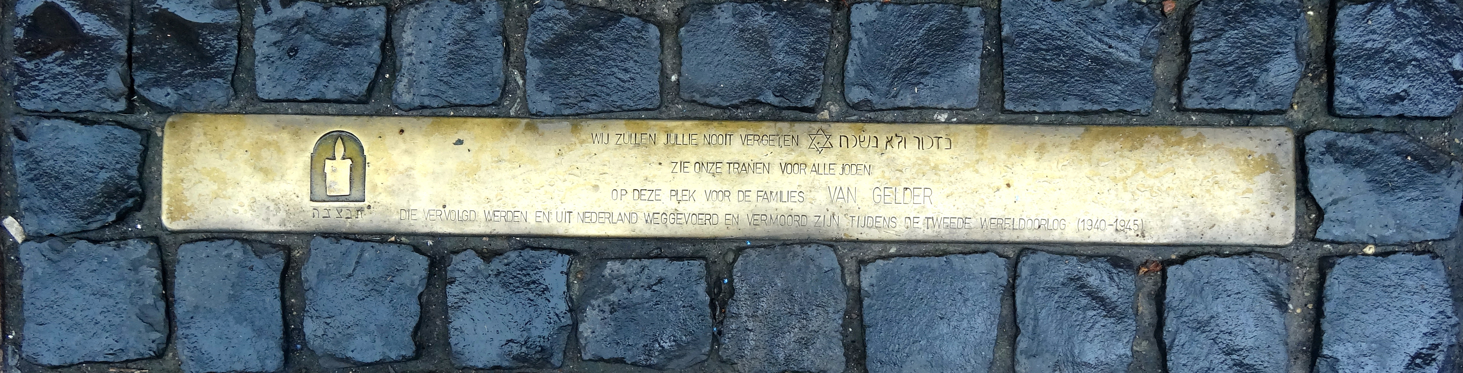 Stolperdrempel, Folkingestraat 34: "Wij zullen jullie nooit vergeten - zie onze tranen voor alle Joden - op deze plek voor de families Van Gelder - die vervolgd werden en uit Nederland weggevoerd en vermoord zijn tijdens de Tweede Wereldoorlog (1940-1945)